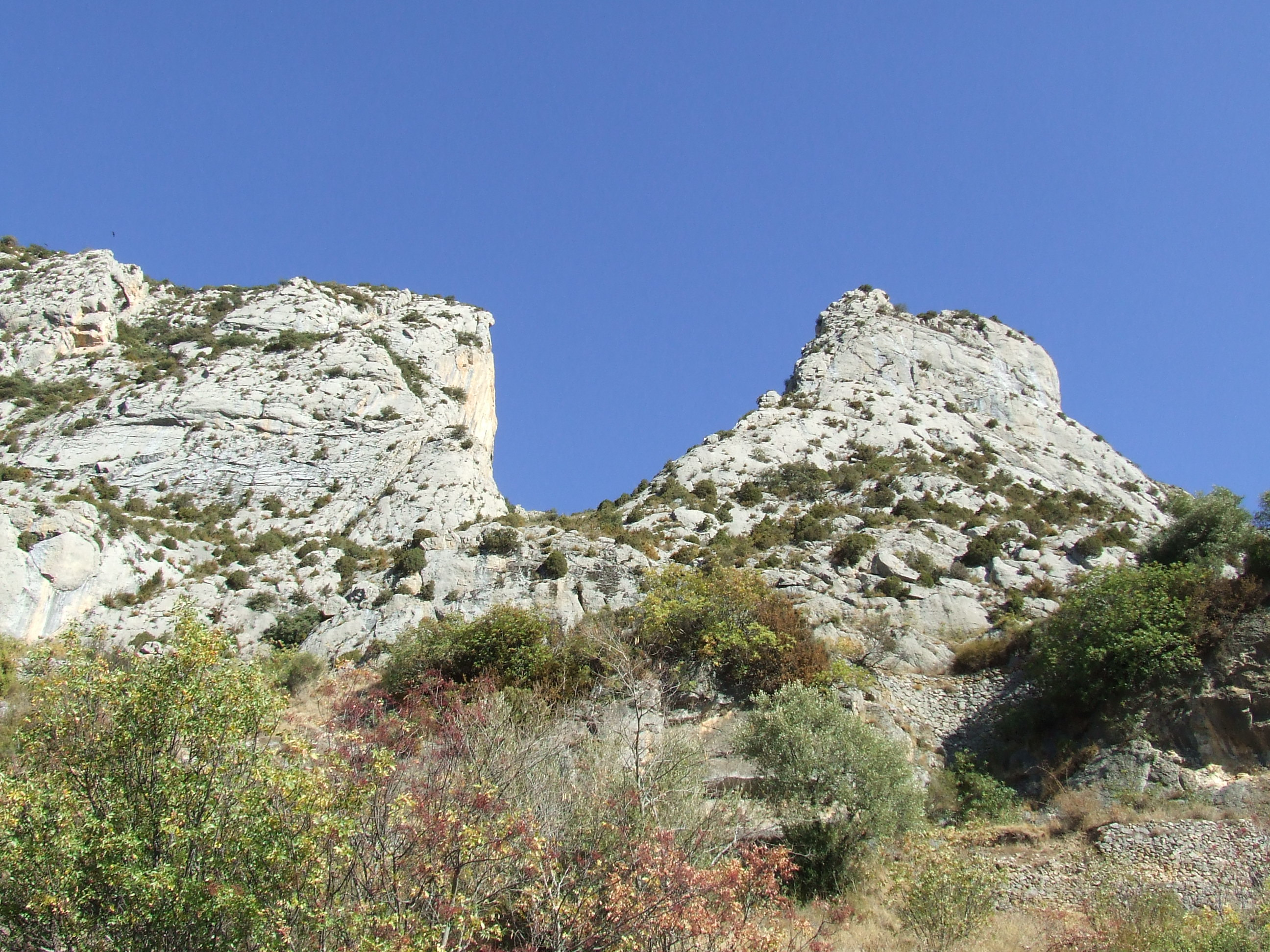 El Pas dels Lladres (Abella de la Conca, Pallars Jussà)